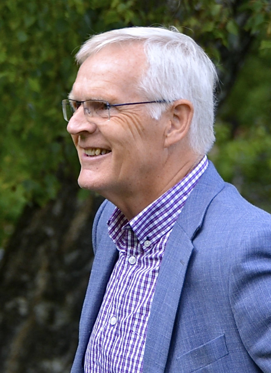 Bosse Ringholm i Vasaparken i Stockholm den 9 september 2014.